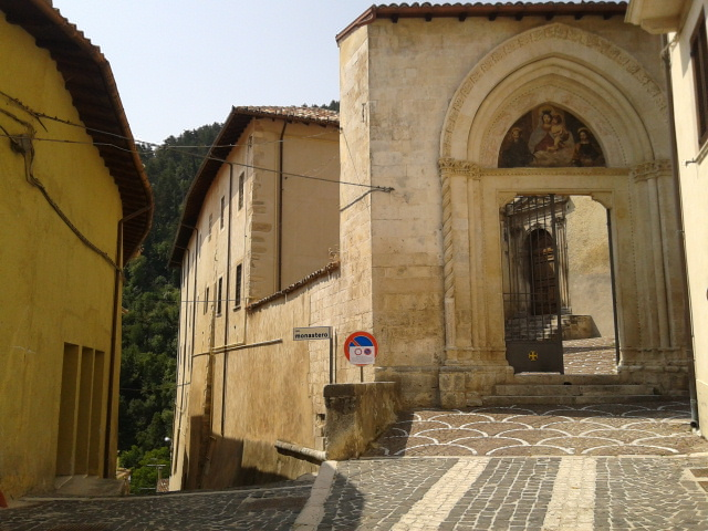 Ingresso chiesa SS. Cosma e Damiano